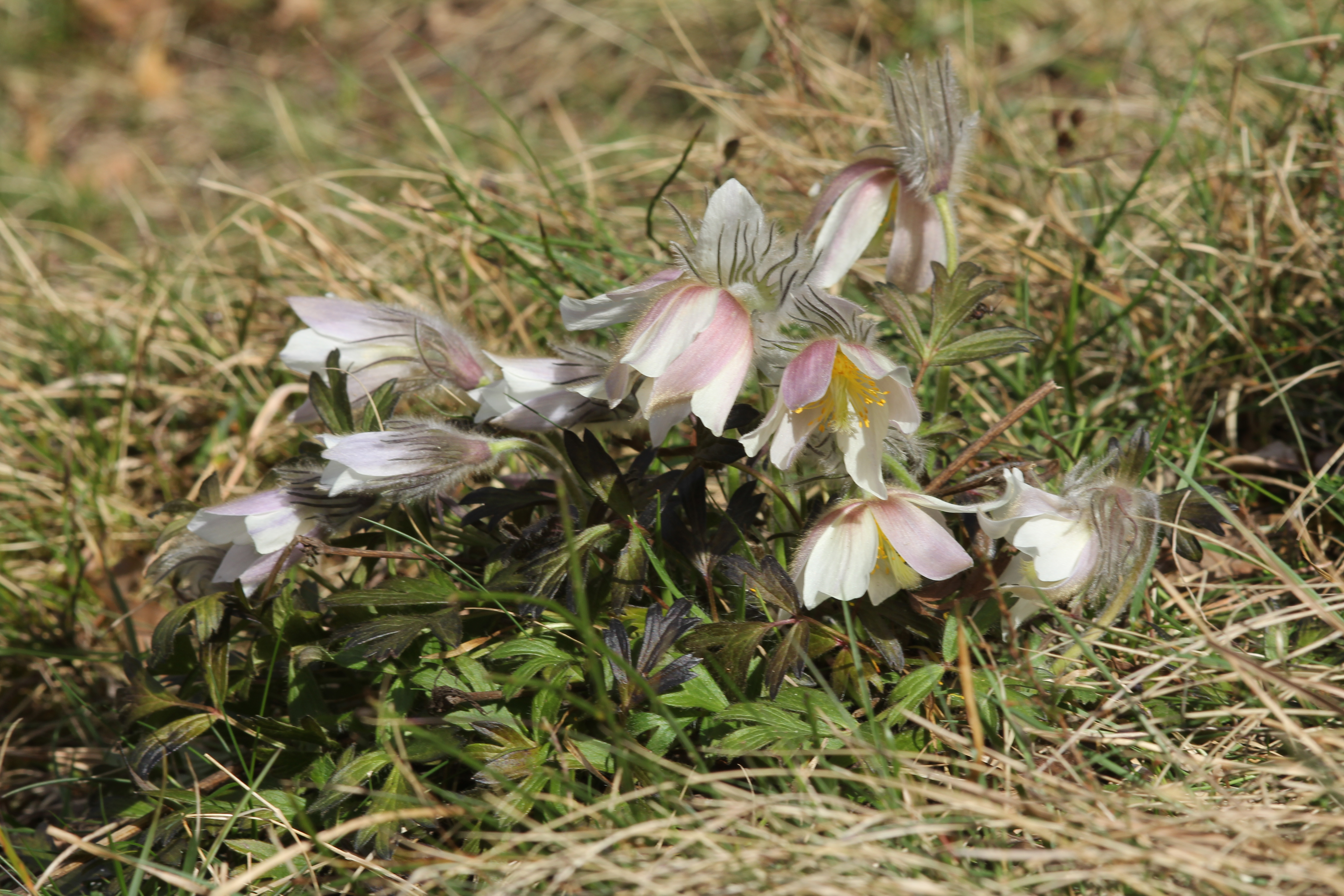 Kozí vršek (přírodní památka) - jaro - Pulsatilla vernalis (L.) Mill, koniklec jarní - status ohrožení v ČR: C1 (kriticky ohrožený)